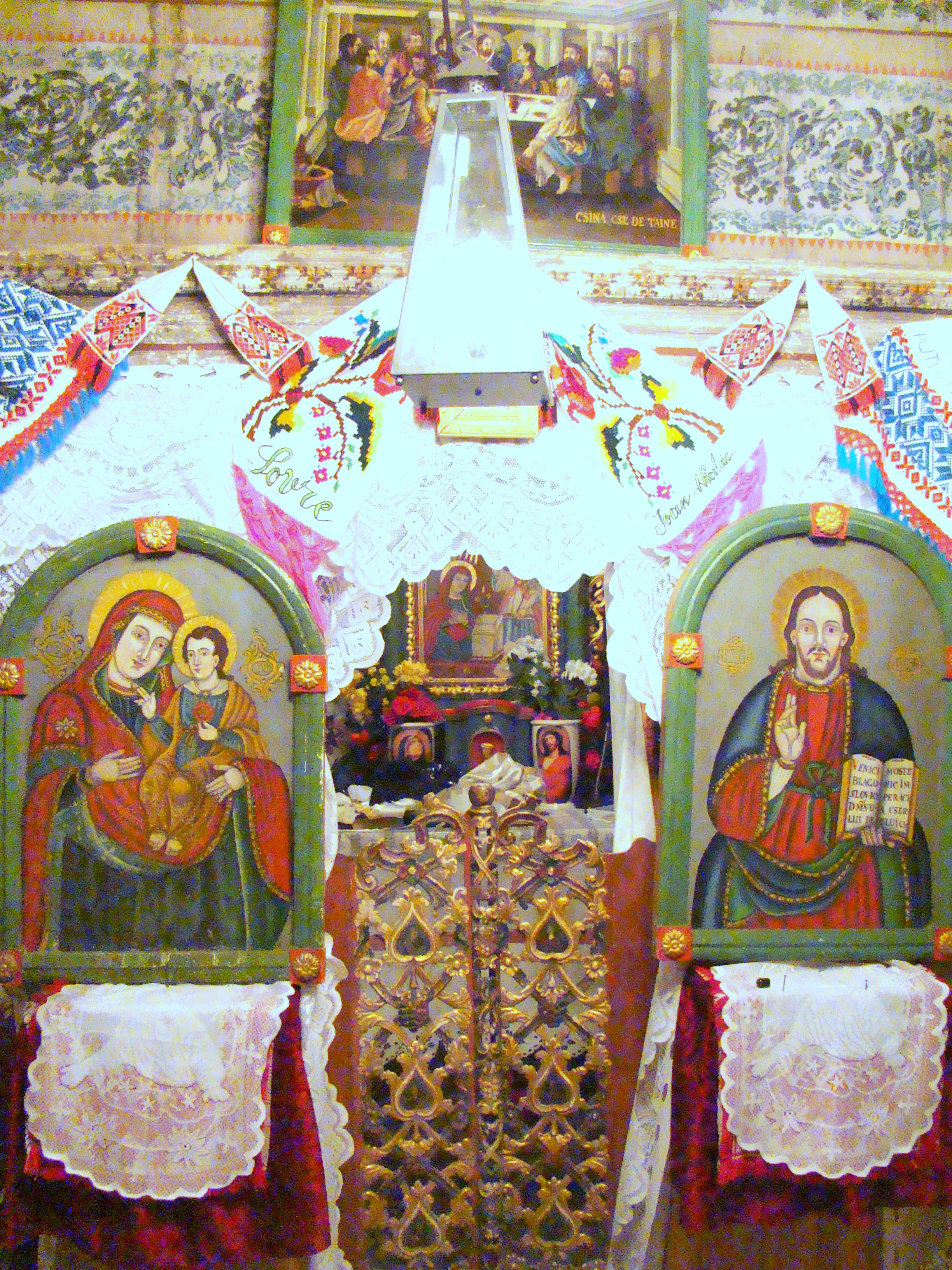 Biserica de lemn din Remecioara-interioare